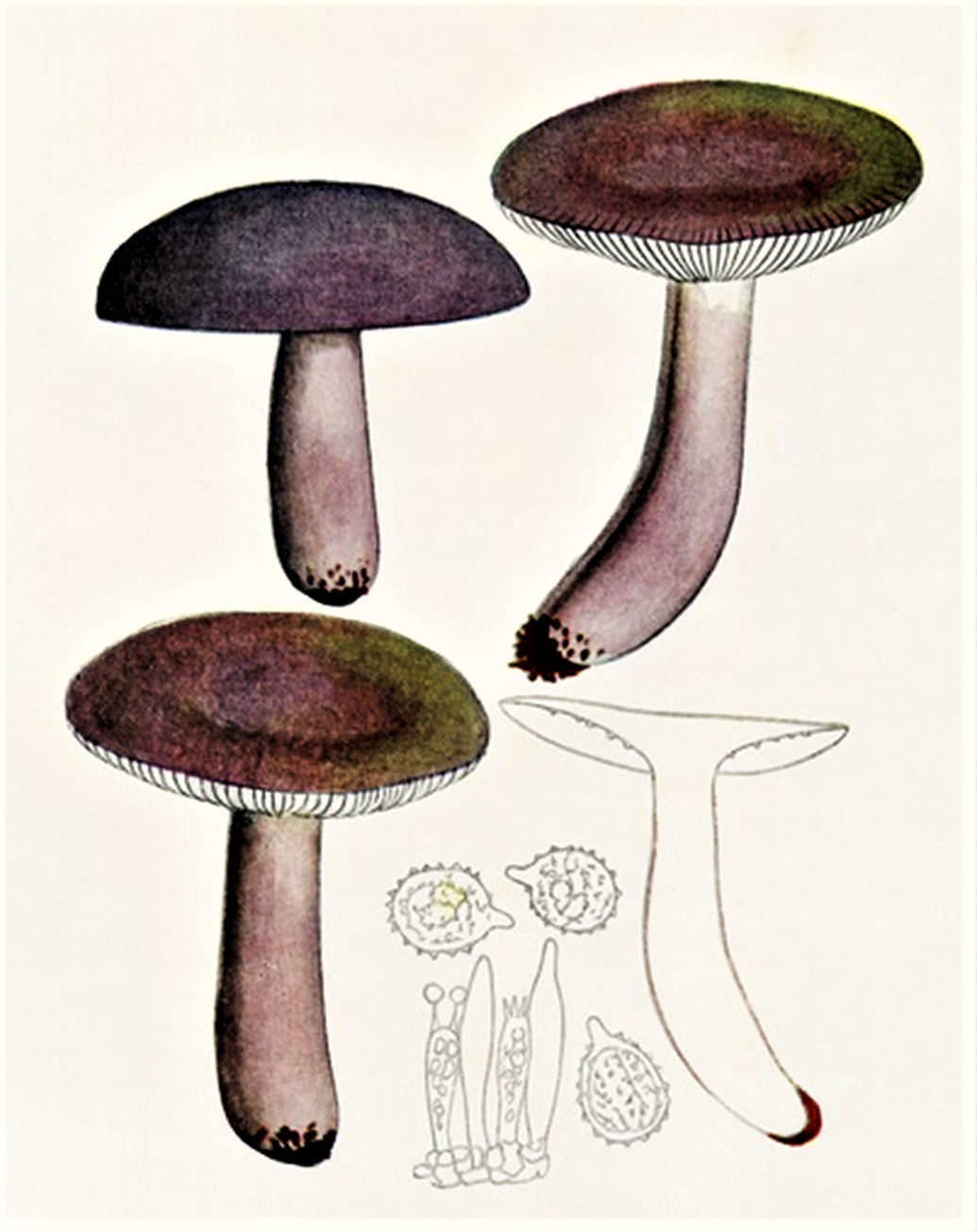 Giacomo Bresadola: Russula queletii Fr. (1872)